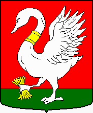 Gemeentewapen Landsmeer